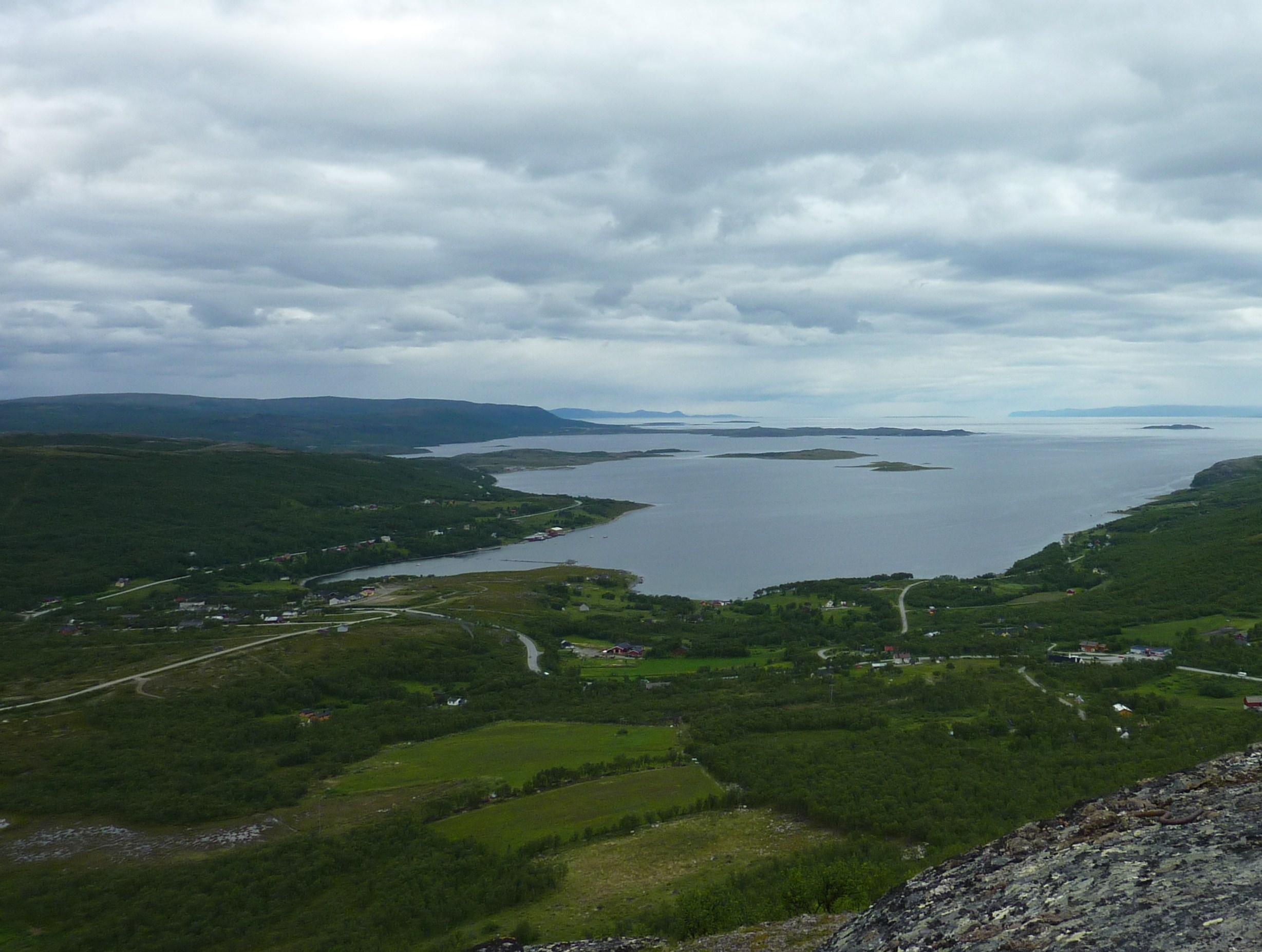 Oversiktsbilde av Indre Billefjord